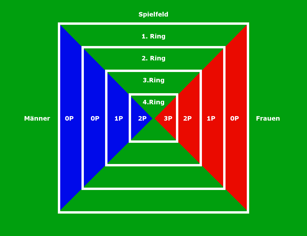 Zu sehen ist das Jokeiba Tor mit den zu erzielenden Punkten für Männer und Frauen.